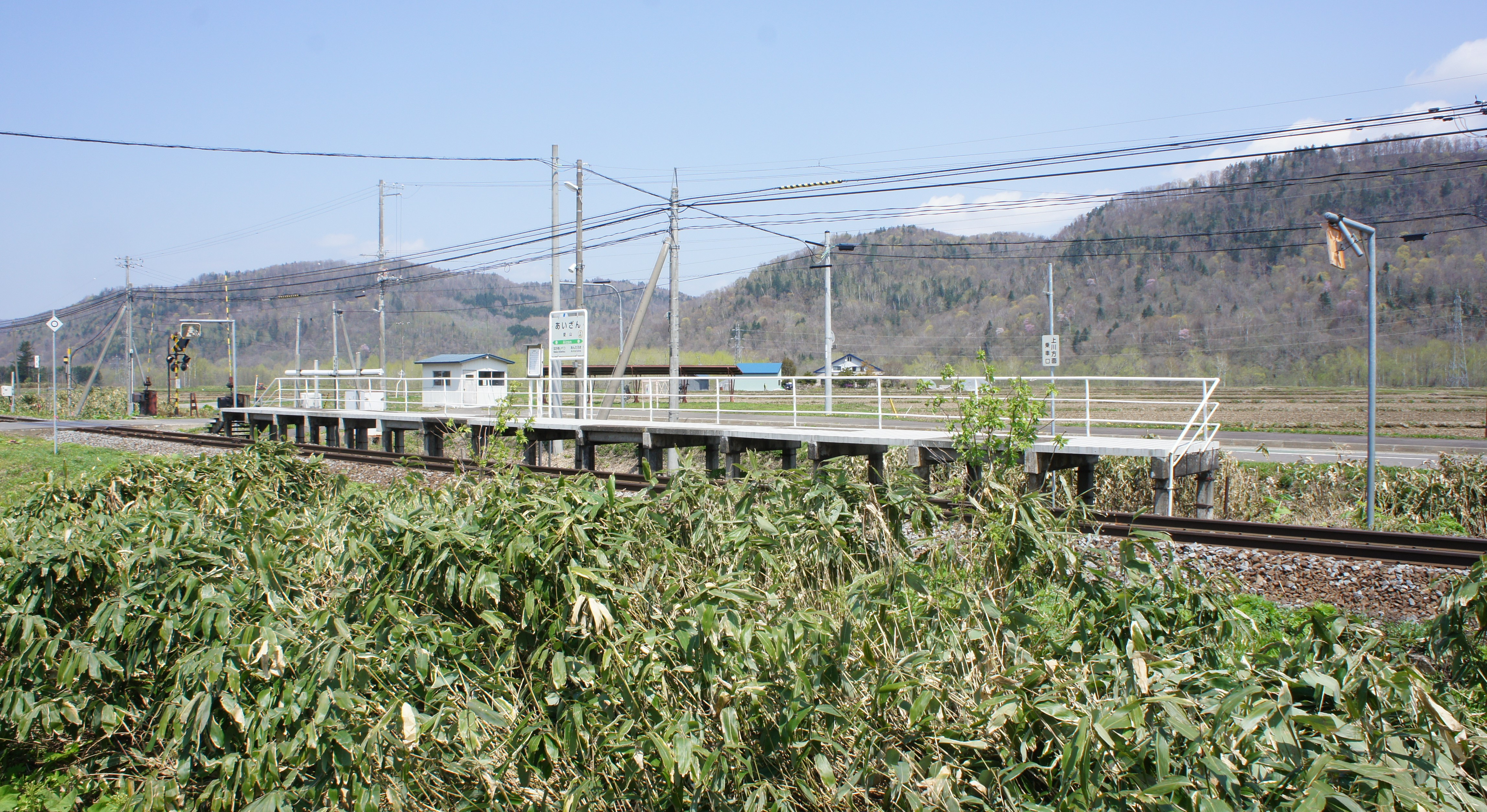 JR石北本線・愛山駅全景